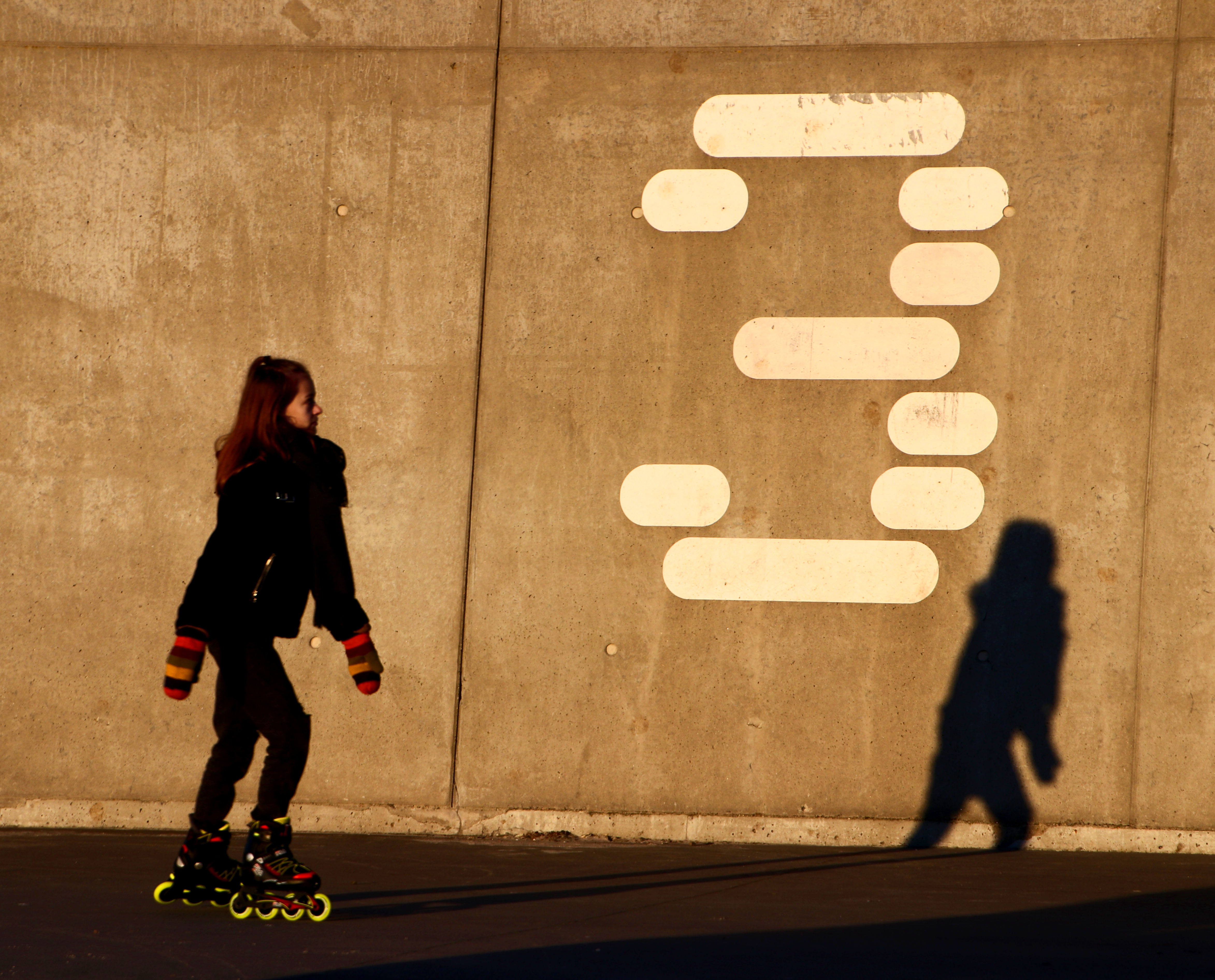 København / Copenhagen. På Amager Strandpark.